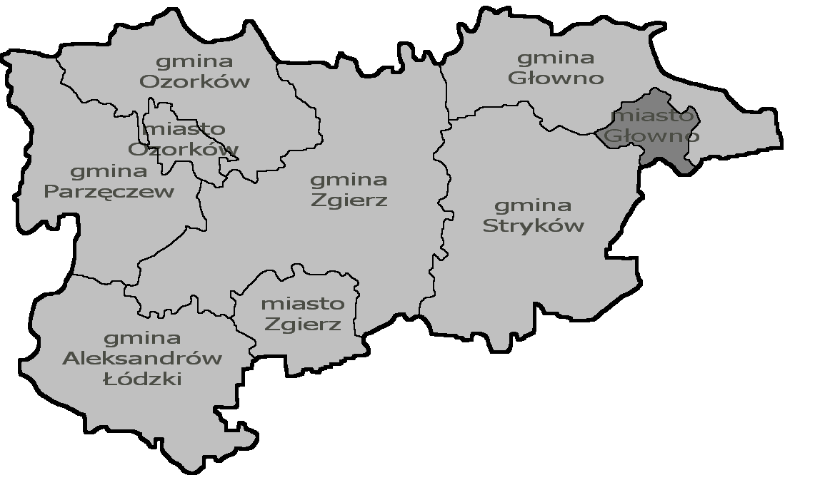 Gmina miejska Głowno na mapie powiatu zgierskiego